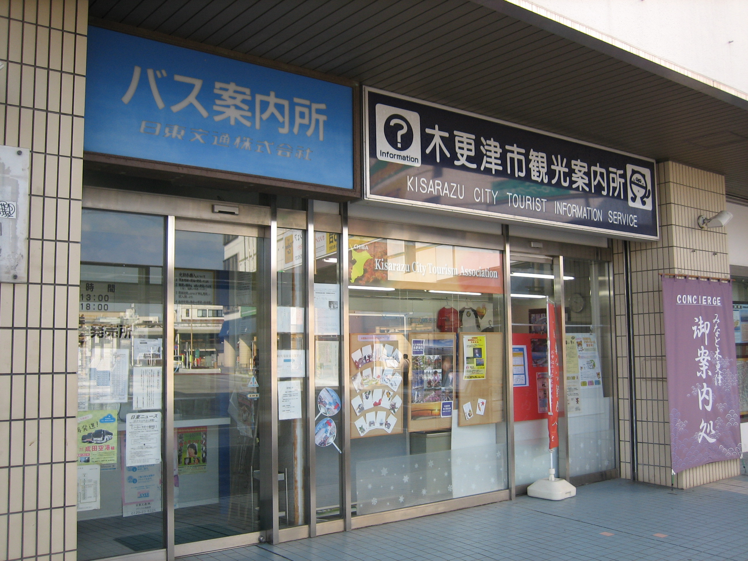 アクア木更津B館1階にあるバス案内所と観光案内所